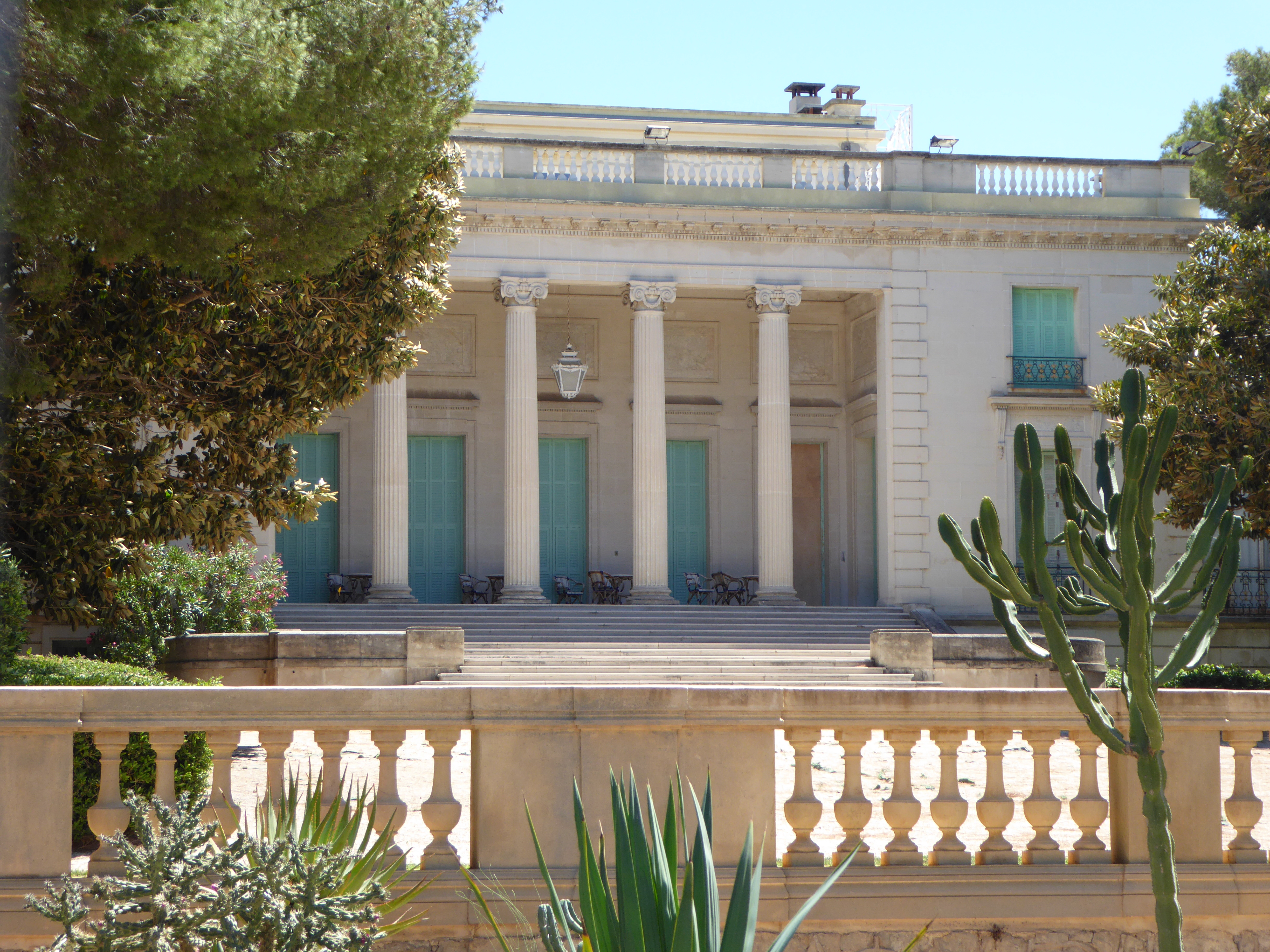 Villa Eilenroc von Charles Garnier